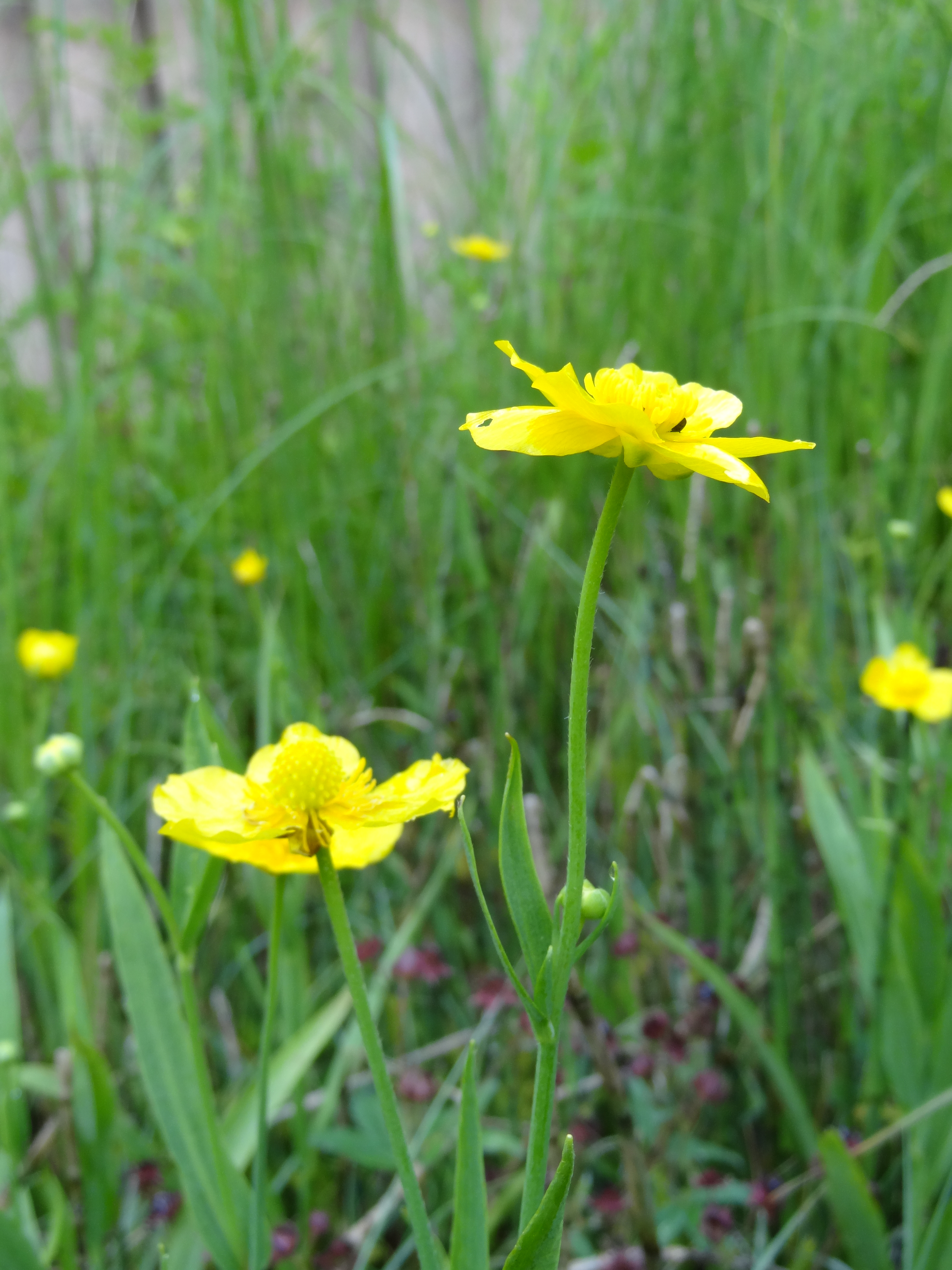 Ranunculaceae, Großer Hahnenfuß, Zungen-Hahnenfuß Deutschland, Bayern, Oberfranken, Selbitz Photo: U.Schmidt, 28.VI.2012